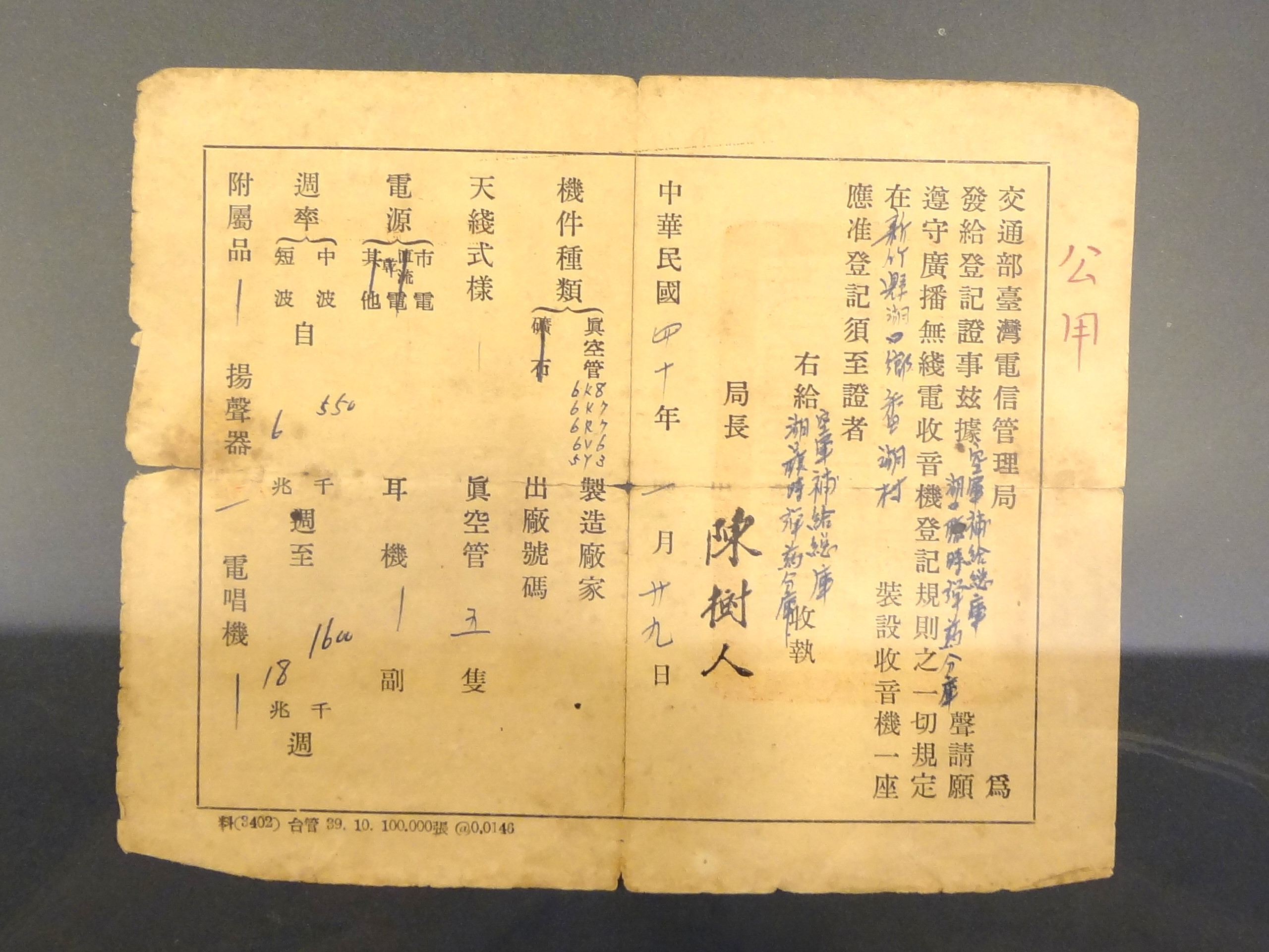 中文（台灣）: 松山文化創意園區「金鐘五十．響」特別展展示品：1951年1月29日，中華民國交通部臺灣電信管理局廣播無線電收音機登記證。